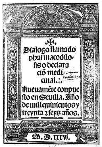 Nicolas Monardes, Pharmacodilosis, 1536, title page